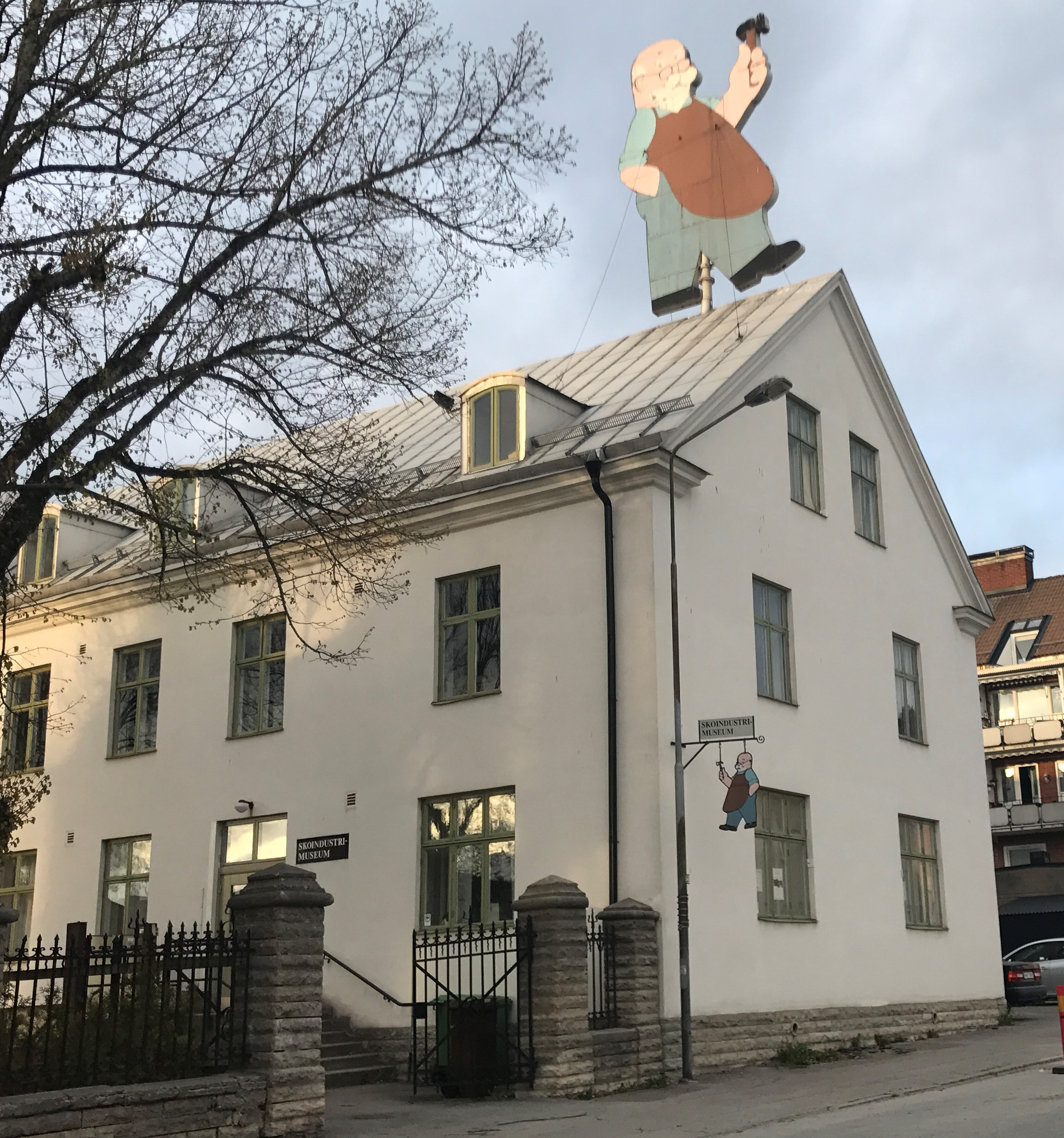 Svenska skoindustrimuseet på Sveavägen i Kumla.